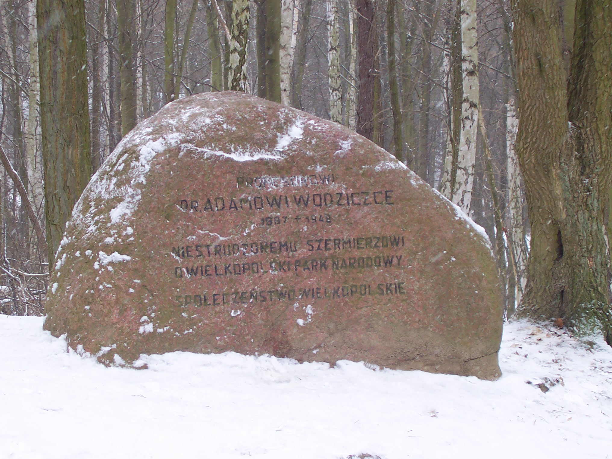 Glaz Wodziczki w Wielkopolskim Parku Narodowym, zima 2006